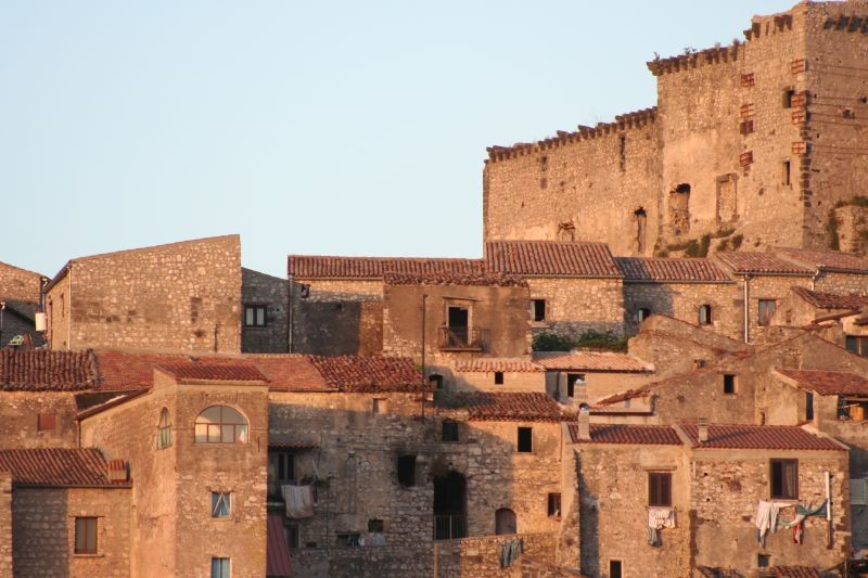 Riardo (Provincia di Caserta), Campania, Italy